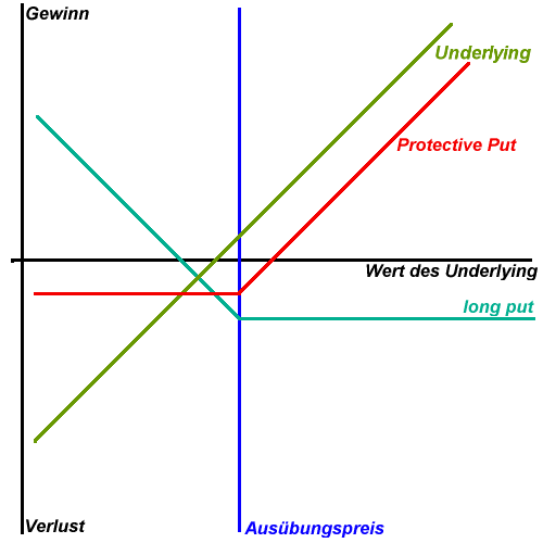 Auszahlungsdiagramm zu einem Protective put